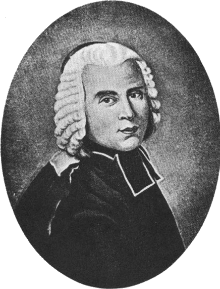 Portrait de l'abbé de Lacaille (Nicolas Louis de Lacaille)